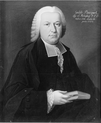 Prof. Gottfried Ploucquet (Tübinger Professorengalerie)